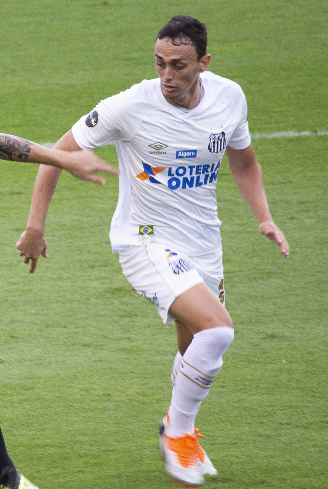 Foto: Douglas Teixeira/Futebol Santista